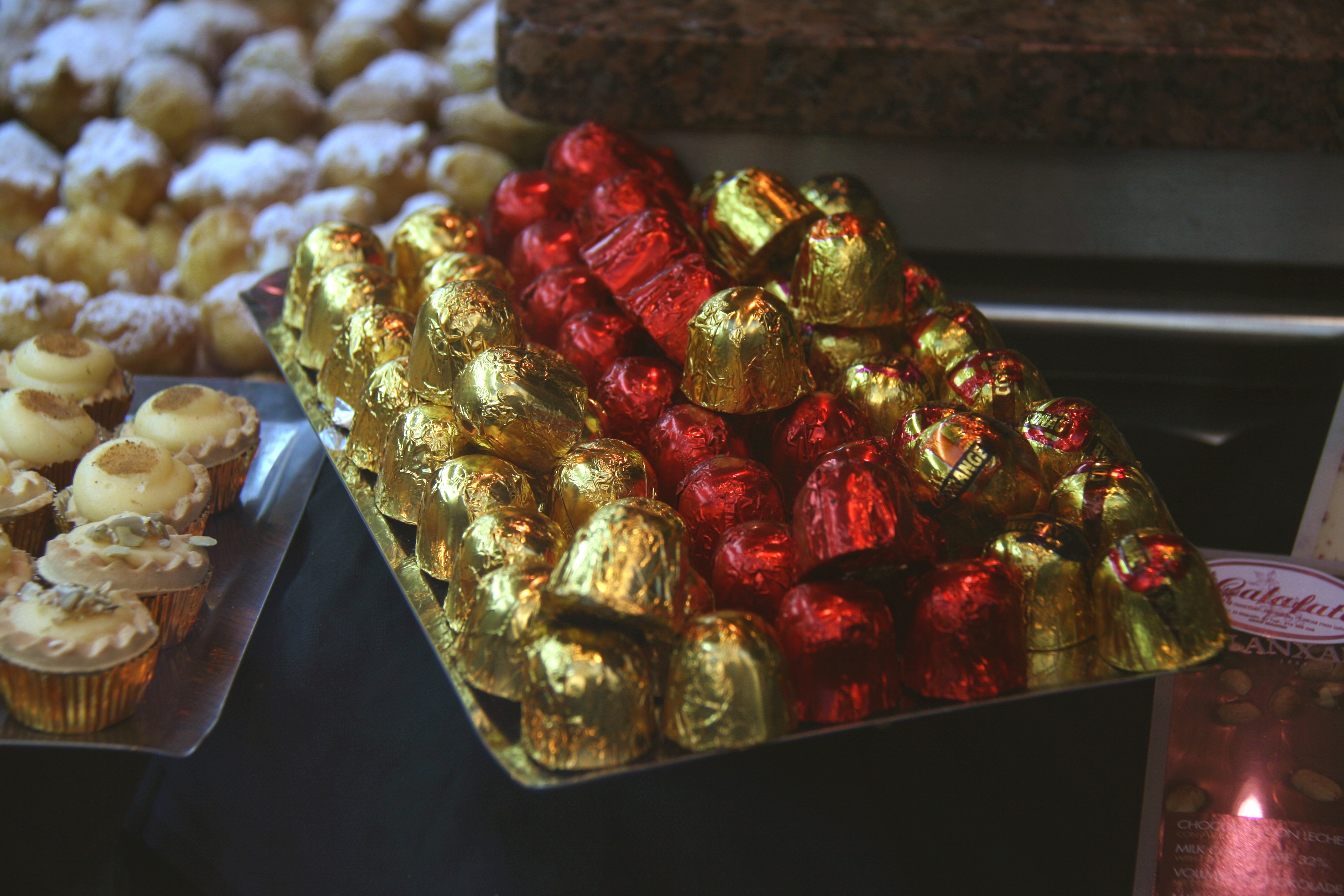 Bombones con sus envolturas plateadas de colores características